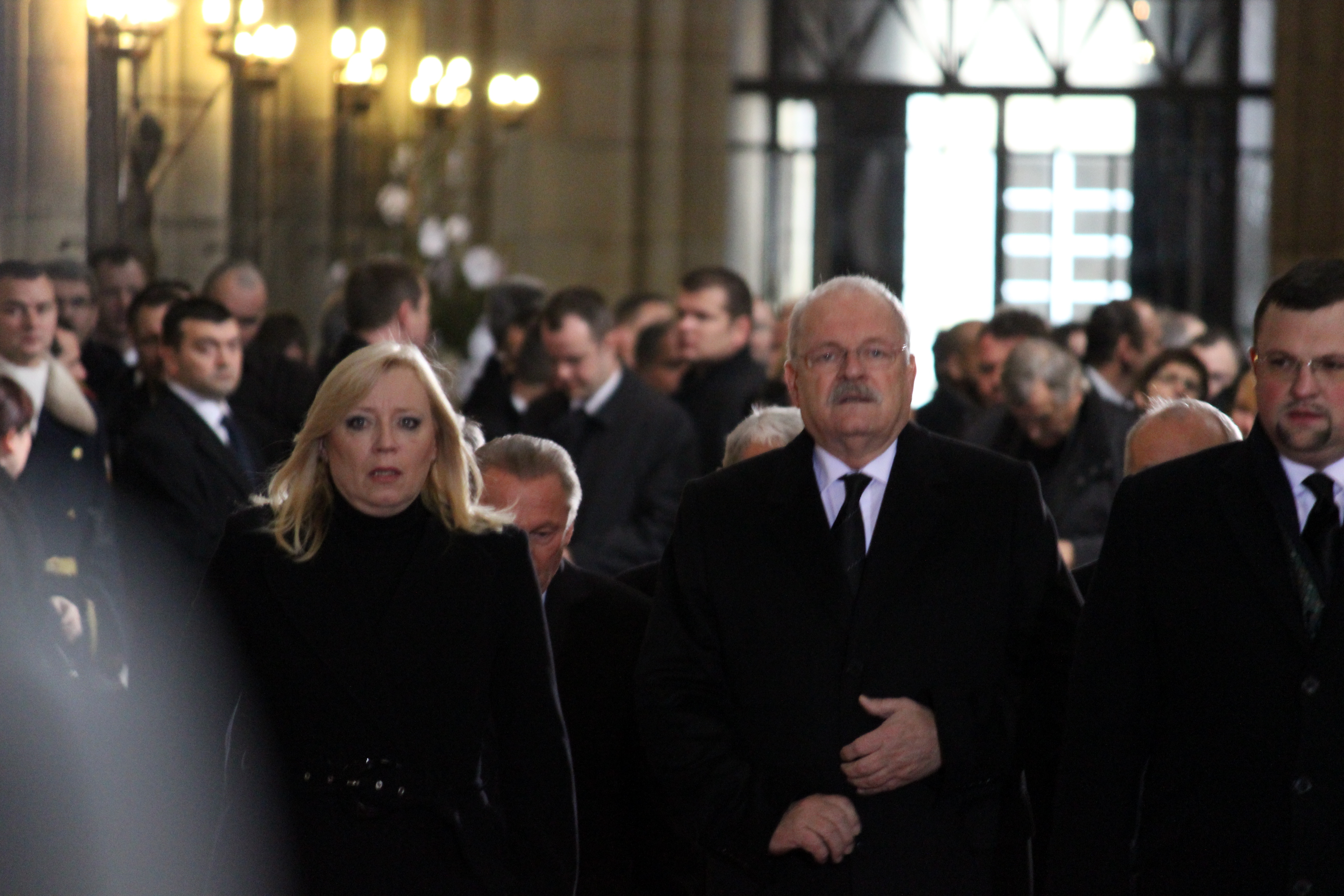 Státní pohřeb Václava Havla, posledního československého a prvního českého prezidenta, proběhl v pátek 23. prosince 2011 od 12.00 hod v katedrále svatého Víta, Václava a Vojtěcha na Pražském hradu. Zúčastnila se jej manželka Dagmar Havlová s dalšími rodinnými příslušníky, nejvyšší čeští ústavní činitelé v čele s prezidentem republiky Václavem Klausem, politici, diplomaté a řada významných hostů z České republiky i zahraničí. This photograph was taken with a DSLR from WMCZ's Camera grant.